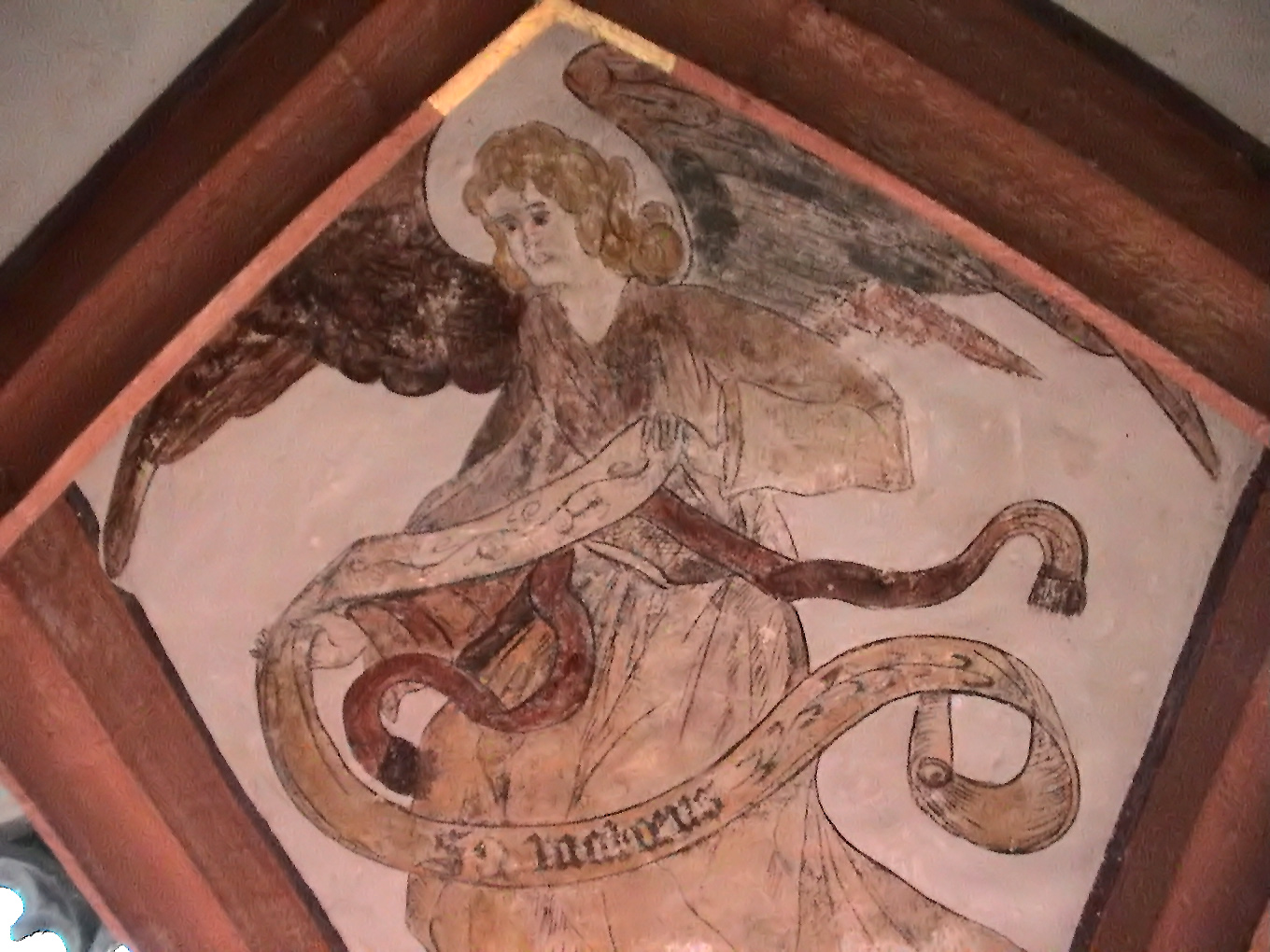 deckenmalerei i. chor - evangelist matthäus der engel, darstellung vor der restauration Licensing Uploaded with Reworkhelper